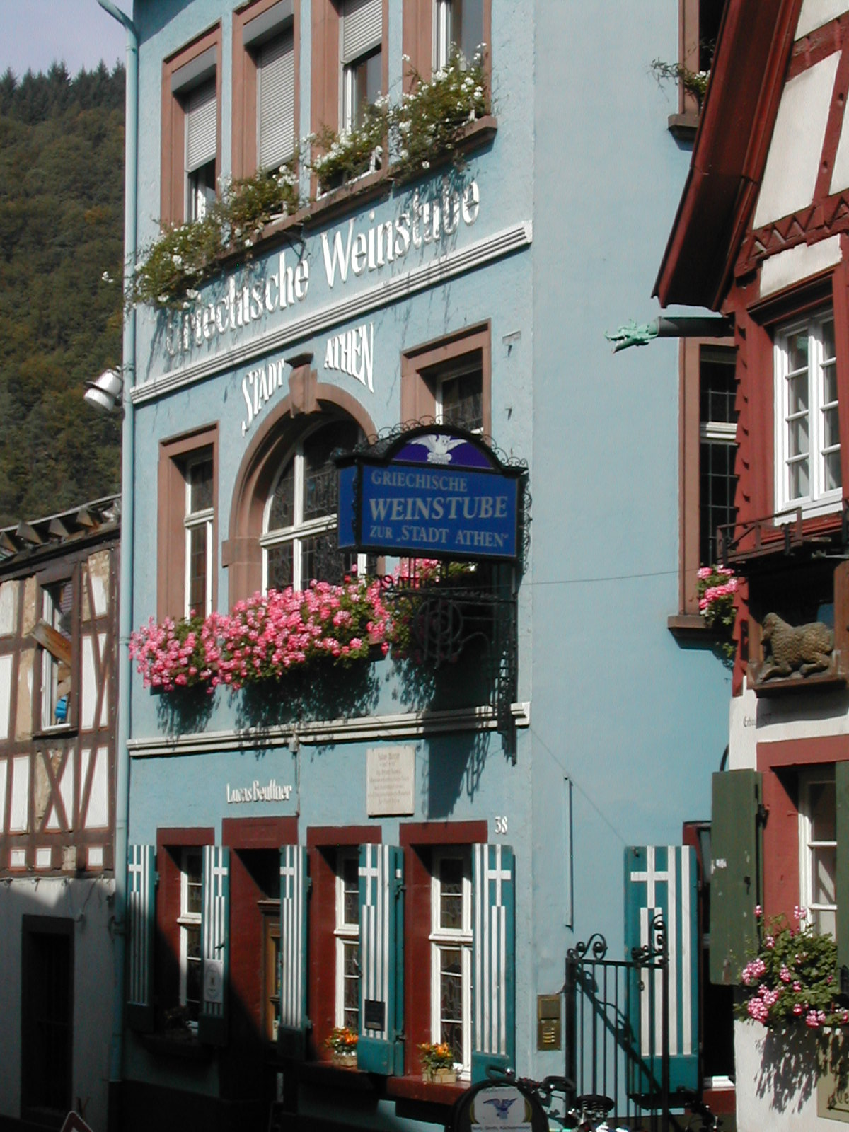 Griechische Weinstube "Zur Stadt Athen" in Neckargemünd des Weingroßhändlers, griechischen Konsuls und Reichstagsabgeordneten Julius Menzer (1846-1917). Die Griechische Weinstube gilt auch als eine der ältesten Studentenlokale der Heidelberger Umgebung.